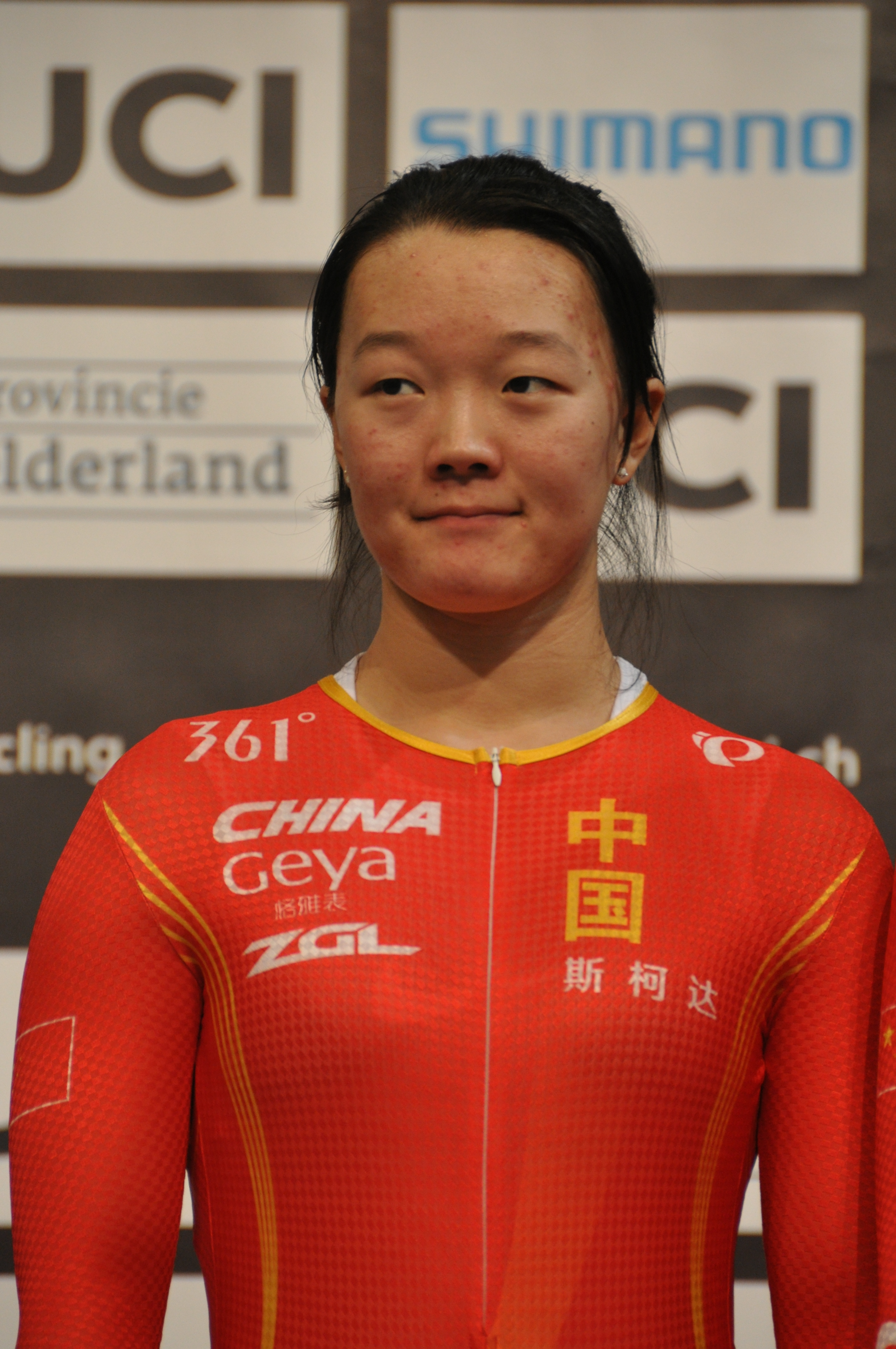 LIU Lili, chinesische Radsportlerin